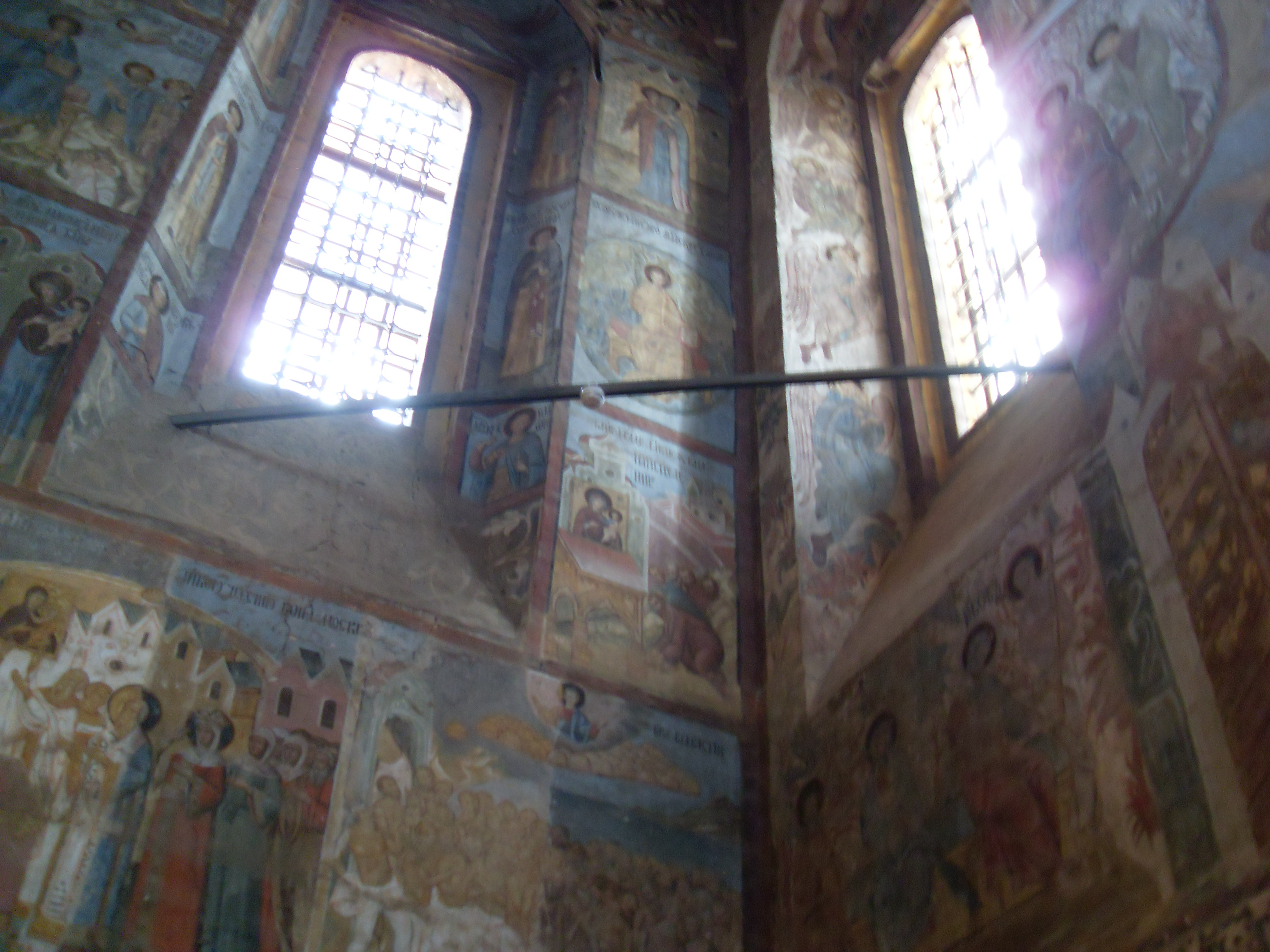 Фресковые росписи. Пожарная сигнализация. Благовещенский собор г. Сольвычегодск